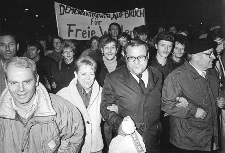 ADN-ZB Kasper 9.11.89 Gera: Nach Friedensgebeten in drei Kirchen formierte sich ein Demonstrationszug mit mehreren zehntausend Teilnehmern in der Bezirksstadt. An der Spitze liefen der Oberbürgermeister Horst Jäger (2.v.r.), Superintendent Otto Heinrich Müller (r) und Vertreter des Neuen Forums.